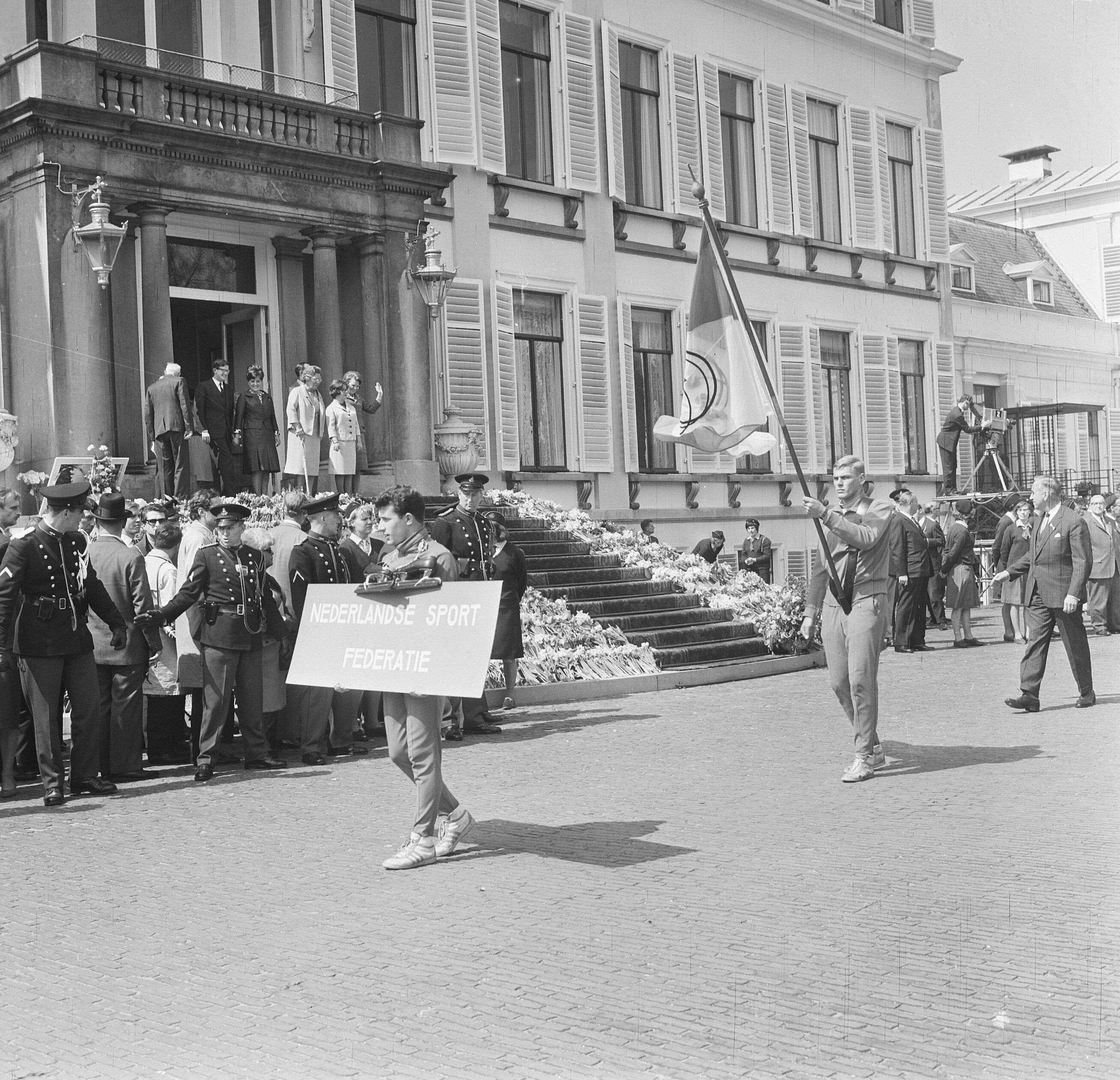 Collectie / Archief : Fotocollectie Anefo Reportage / Serie : Koninginnedag 1965 Beschrijving : De afvaardiging Nederlandse Sport Federatie loopt langs het bordes. Schaatser Ard Schenk draagt de vlag Datum : 30 april 1965 Locatie : Soestdijk, Utrecht Trefwoorden : bordessen, defilés, koninginnen, verjaardagen, vlaggen Persoonsnaam : Schenk, Ard Fotograaf : Koch, Eric / Anefo Auteursrechthebbende : Nationaal Archief Materiaalsoort : Negatief (zwart/wit) Nummer archiefinventaris : bekijk toegang 2.24.01.03 Bestanddeelnummer : 917-7126